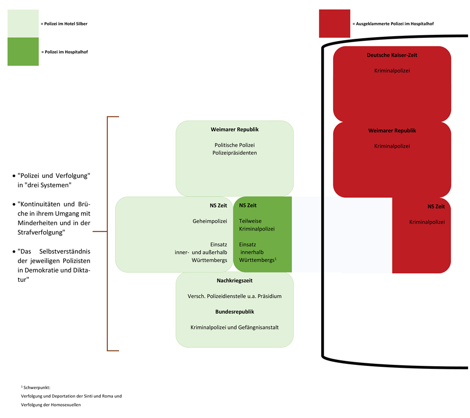 Zwei Standorte